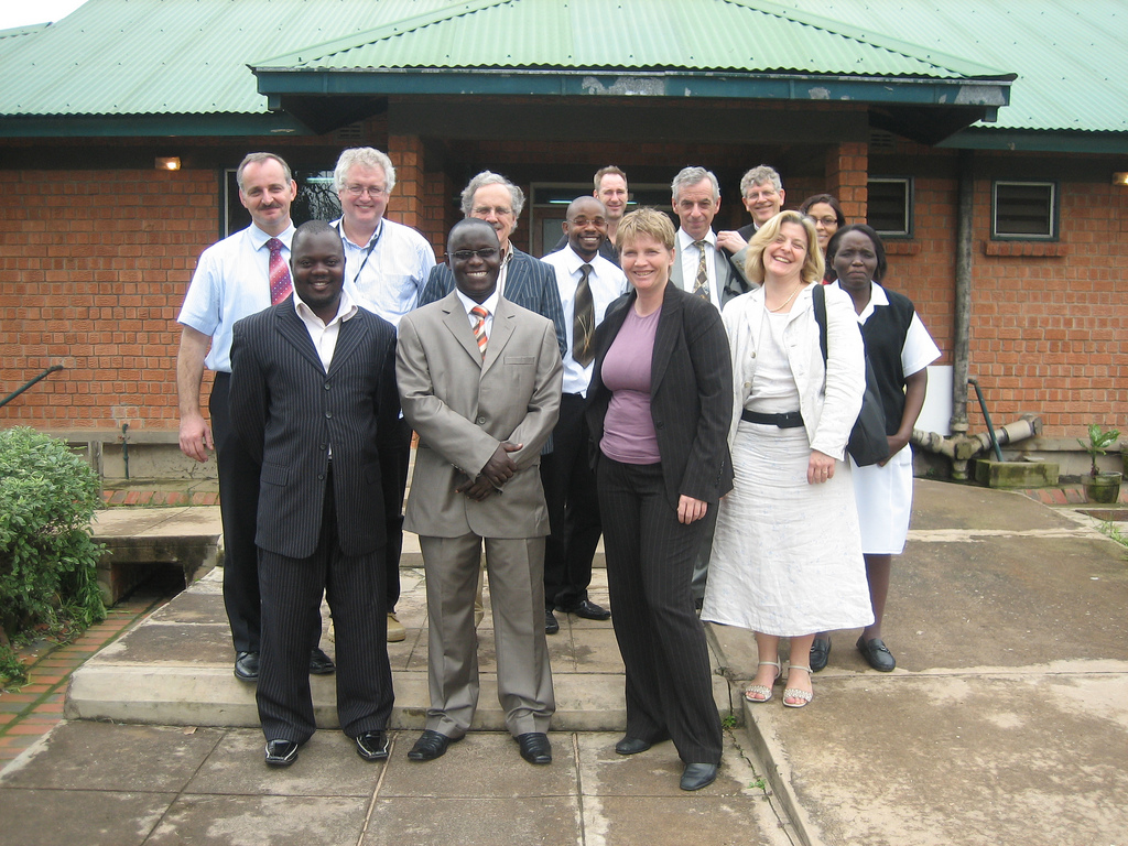 IICD board visit Jan 2008 Zambia (1)